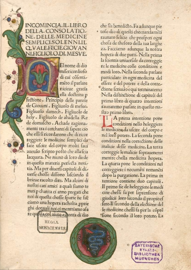 Pseudo-Mesue, Italian translation, 1475, page 1